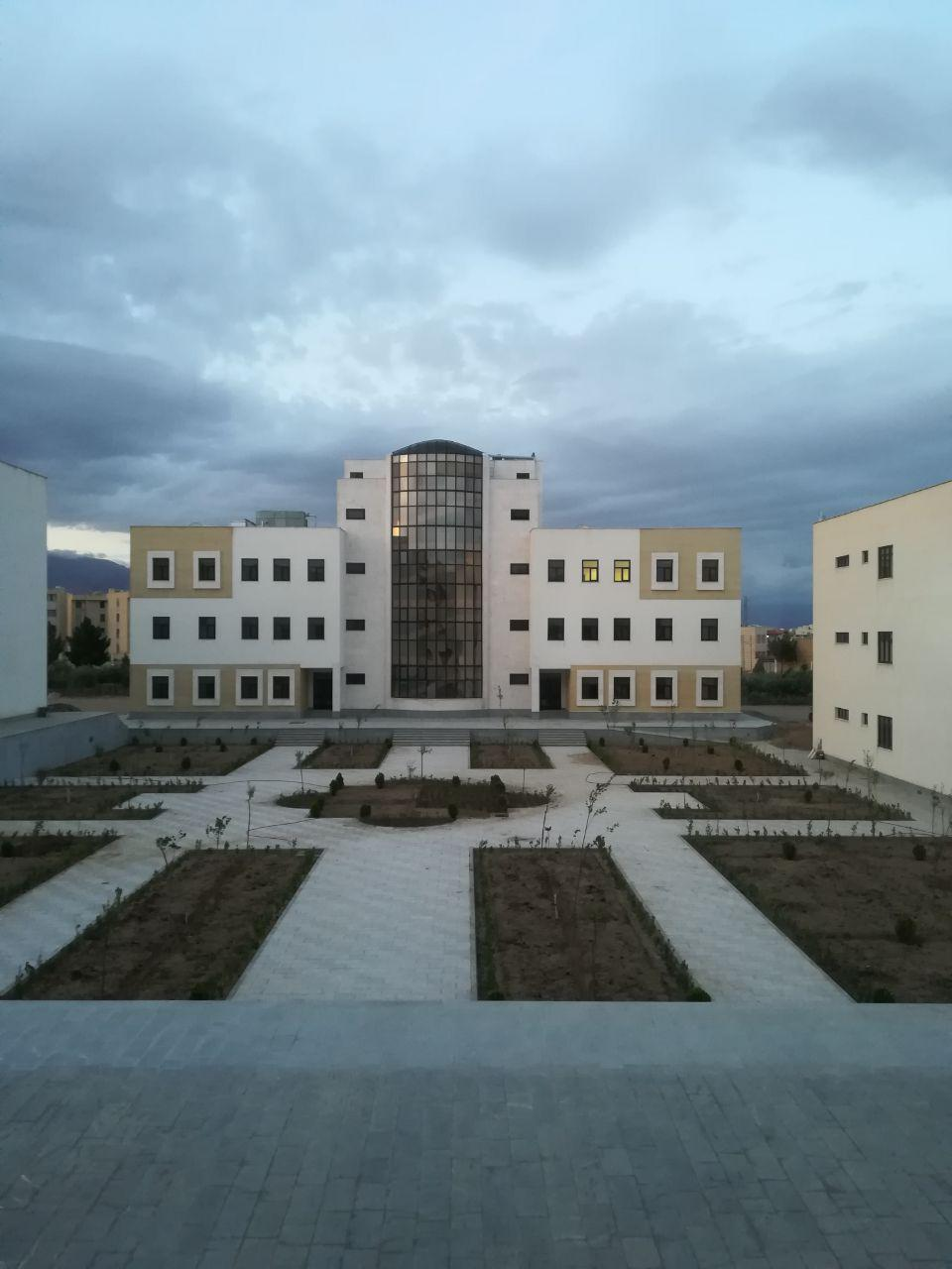 ساختمان تازه تاسیس دانشگاه دامغان